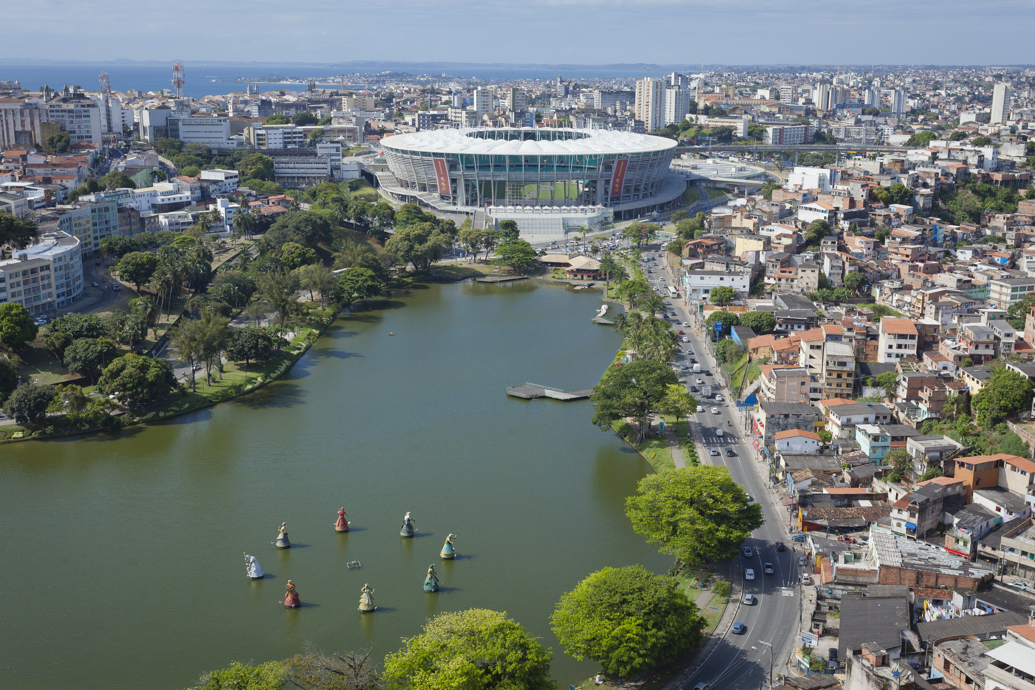 Arena Fonte Nova, Stadion für die WM 2014